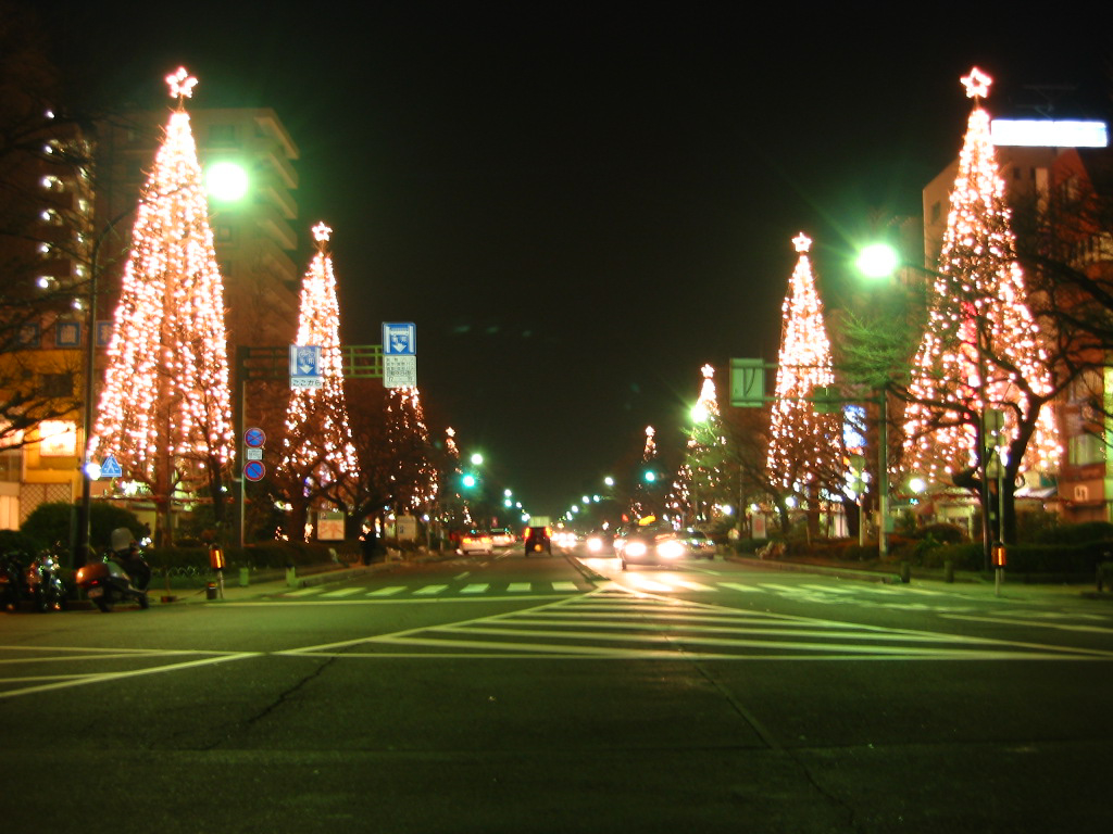 Daigaku avenue in Kunitachi, Tokyo, Japan.